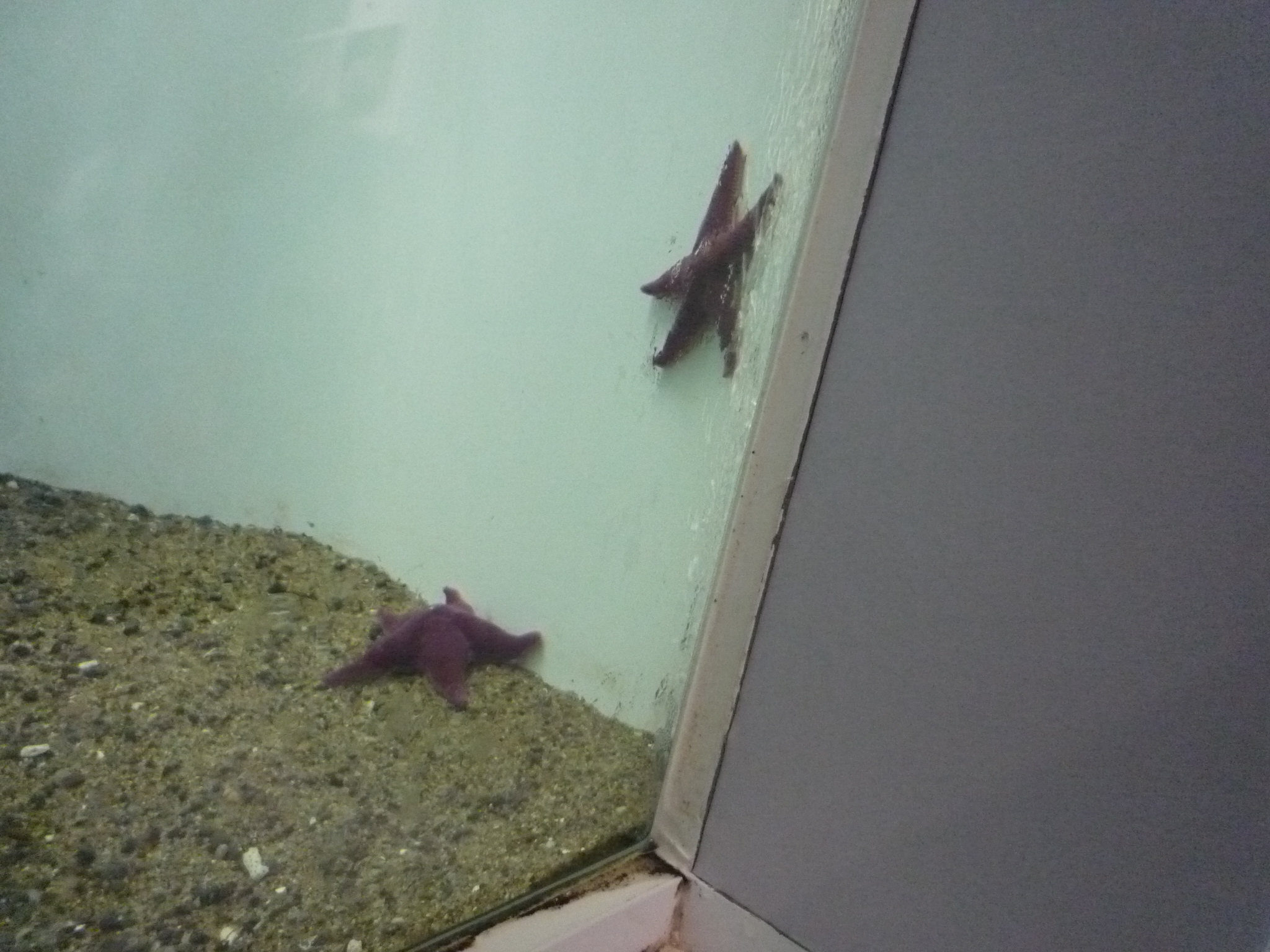 葛西臨海水族園にて